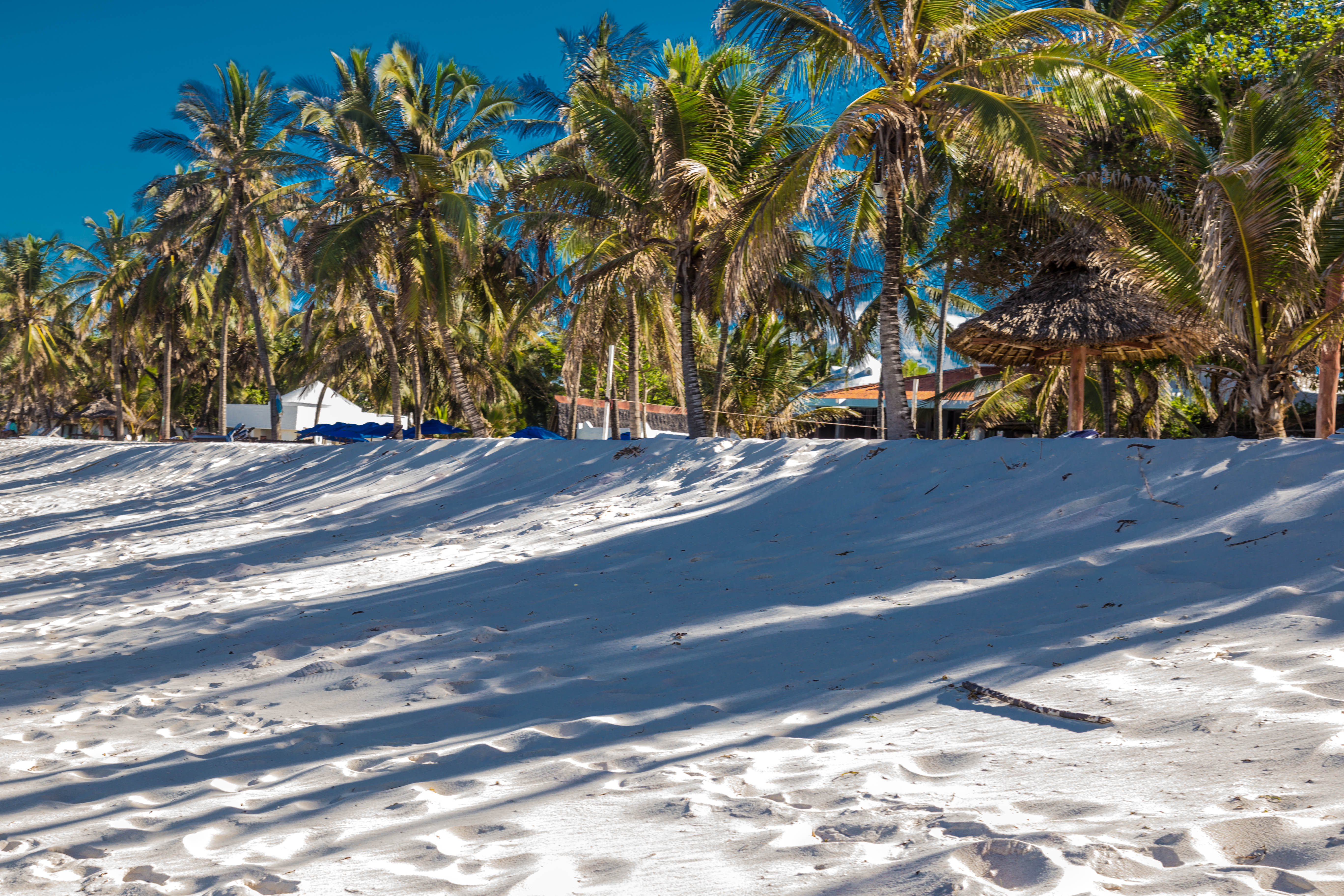 Typischer Strandabschnitt in Diani Beach